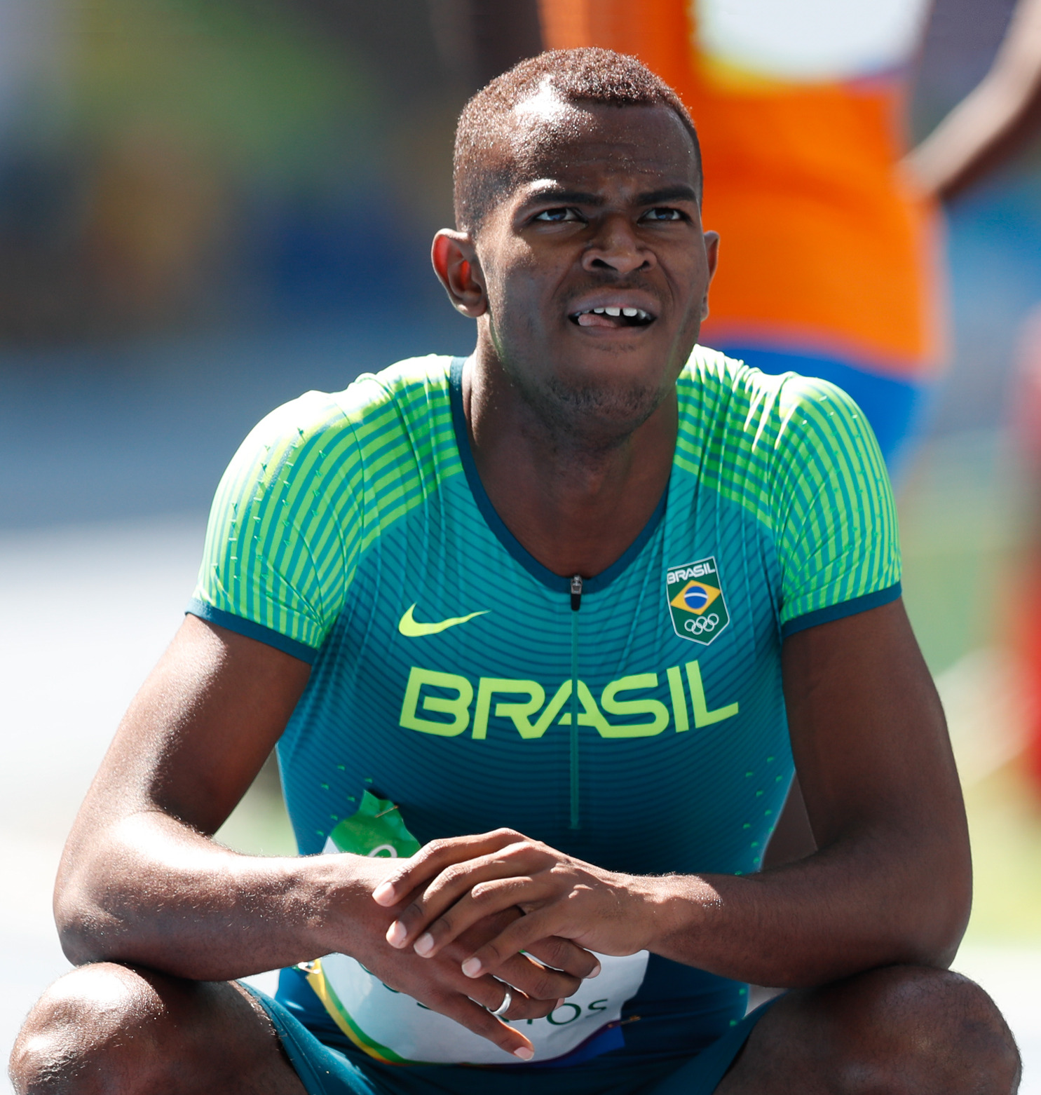 Men's 100 m sprint heats